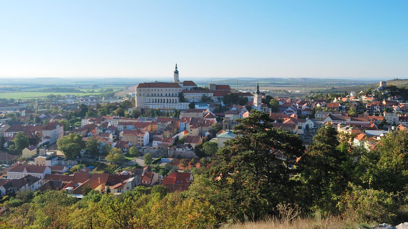 Mikulov sett från Svatý kopeček, Tjeckien, 2011